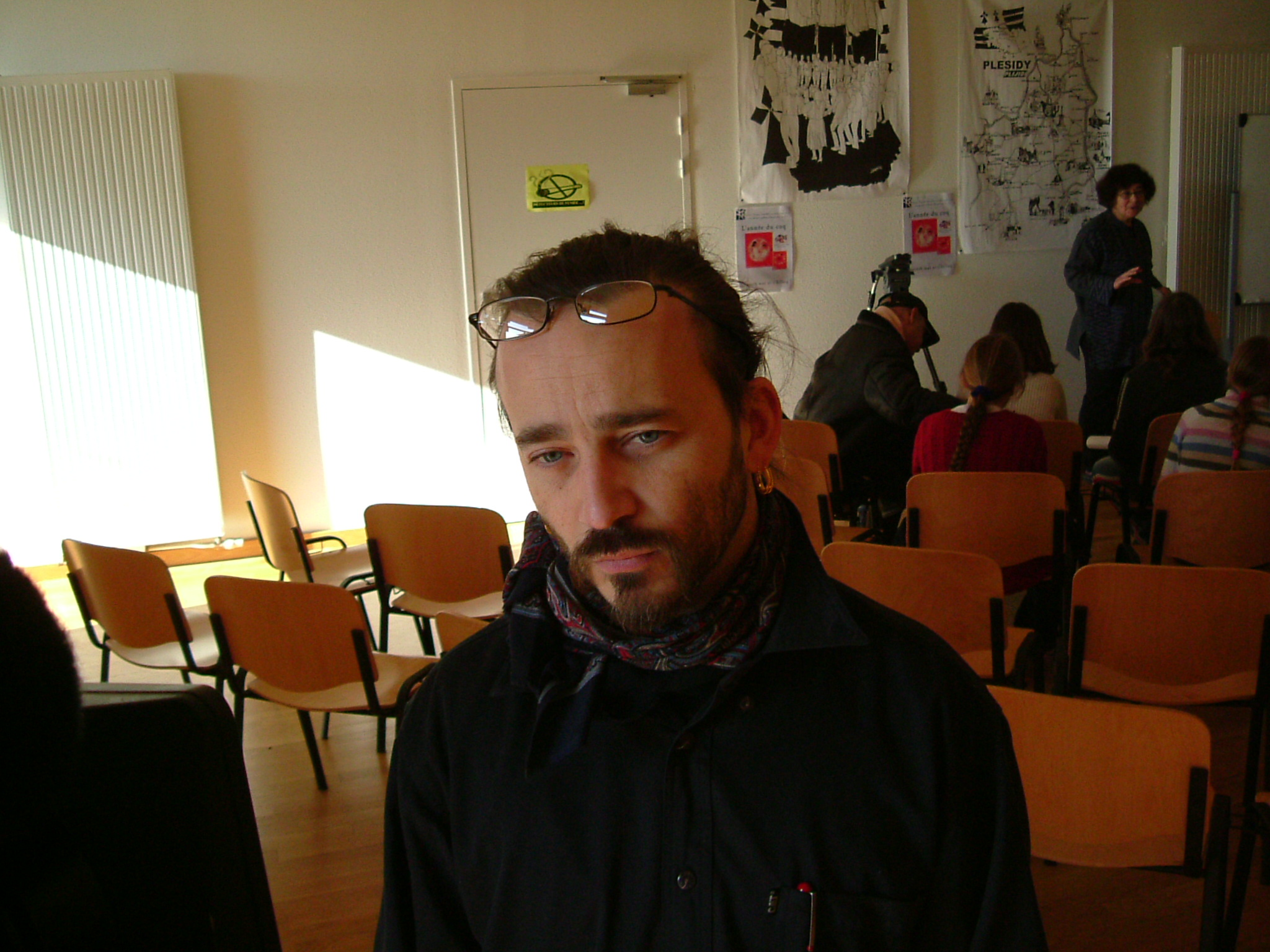 Luc'hskeudenn tennet d'ar 7 a viz C'hwevrer 2005 e Skolaj Diwan Bro-Dreger e Plijidi.